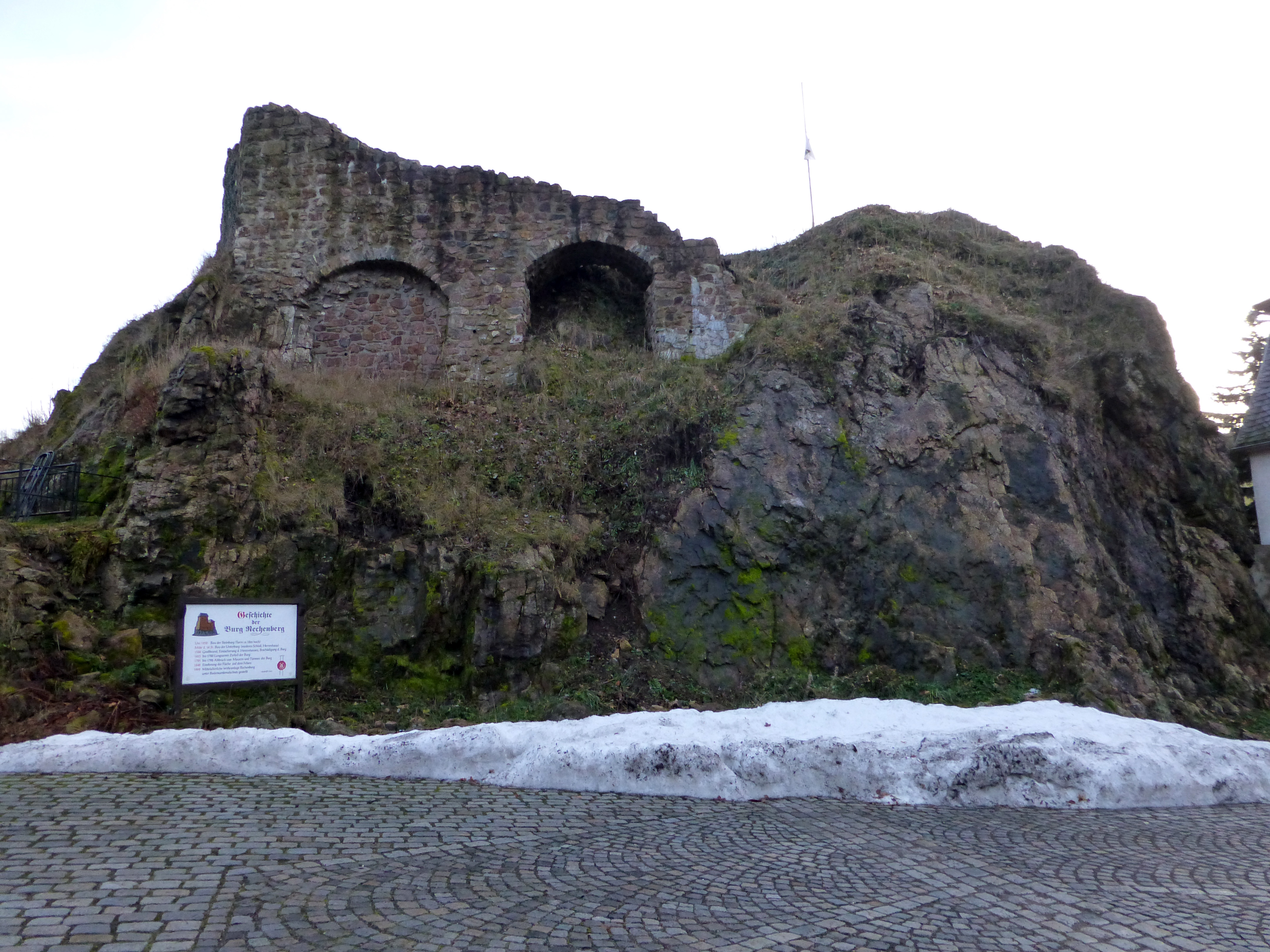 Burgruine Rechenberg (Landkreis Mittelsachsen)